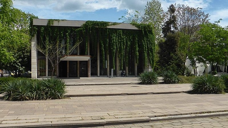 Сградата на Дом на младоженците - 2017г.